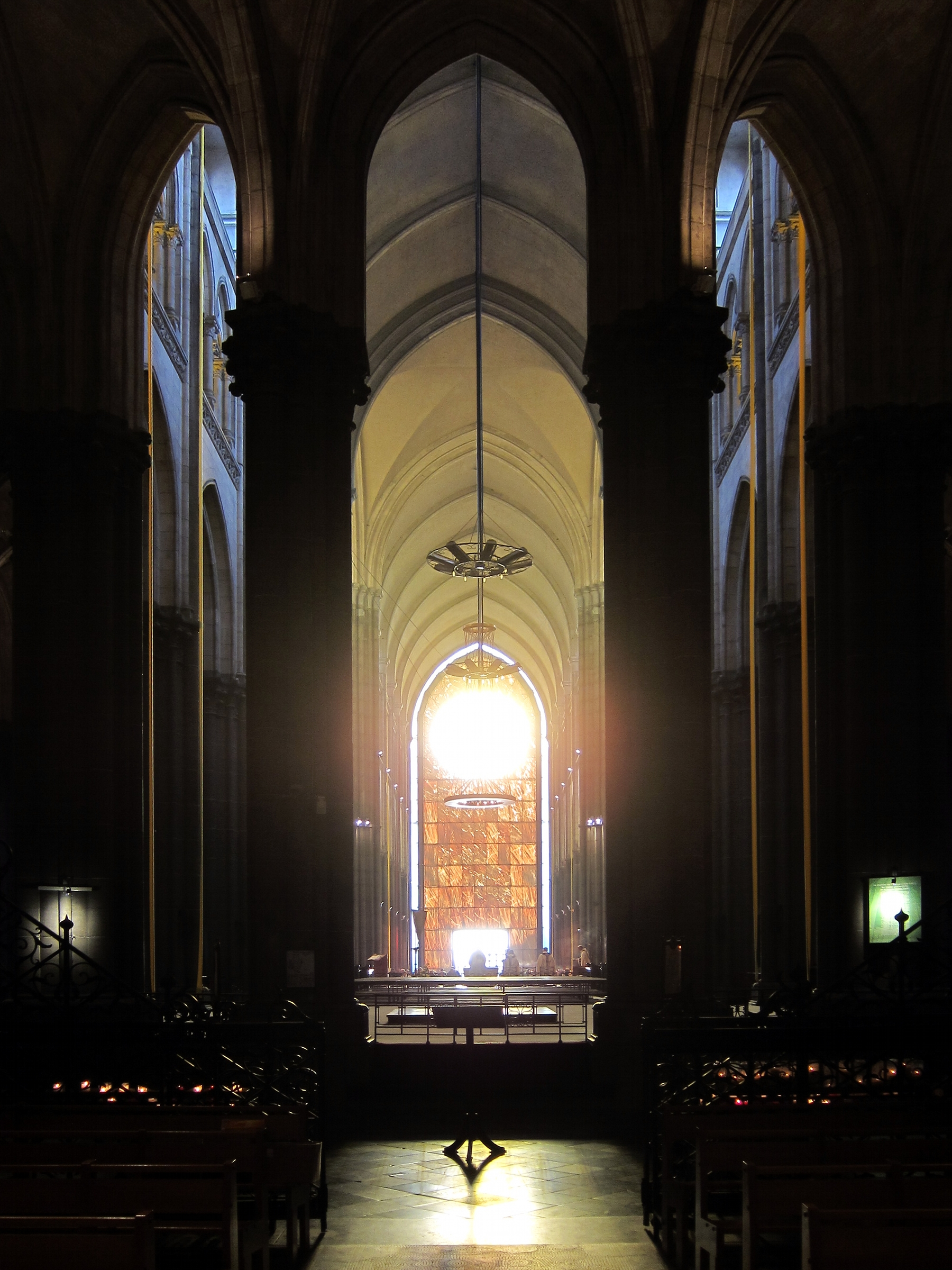 La nef de la Cathédrale Notre-Dame-de-la-Treille de Lille vue depuis le la Sainte Chapelle.